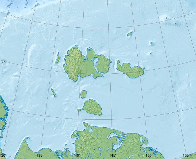 Новосибирские острова, физическая карта. Проекция: Lambert Azimuthal Equal-Area Longitude and latitude of the projection center: 143 / 74.5 Инструменты: GMT Координаты для GMT: -JA143/74.5/4.5i -R129.8/70.8/163.2/77.5r